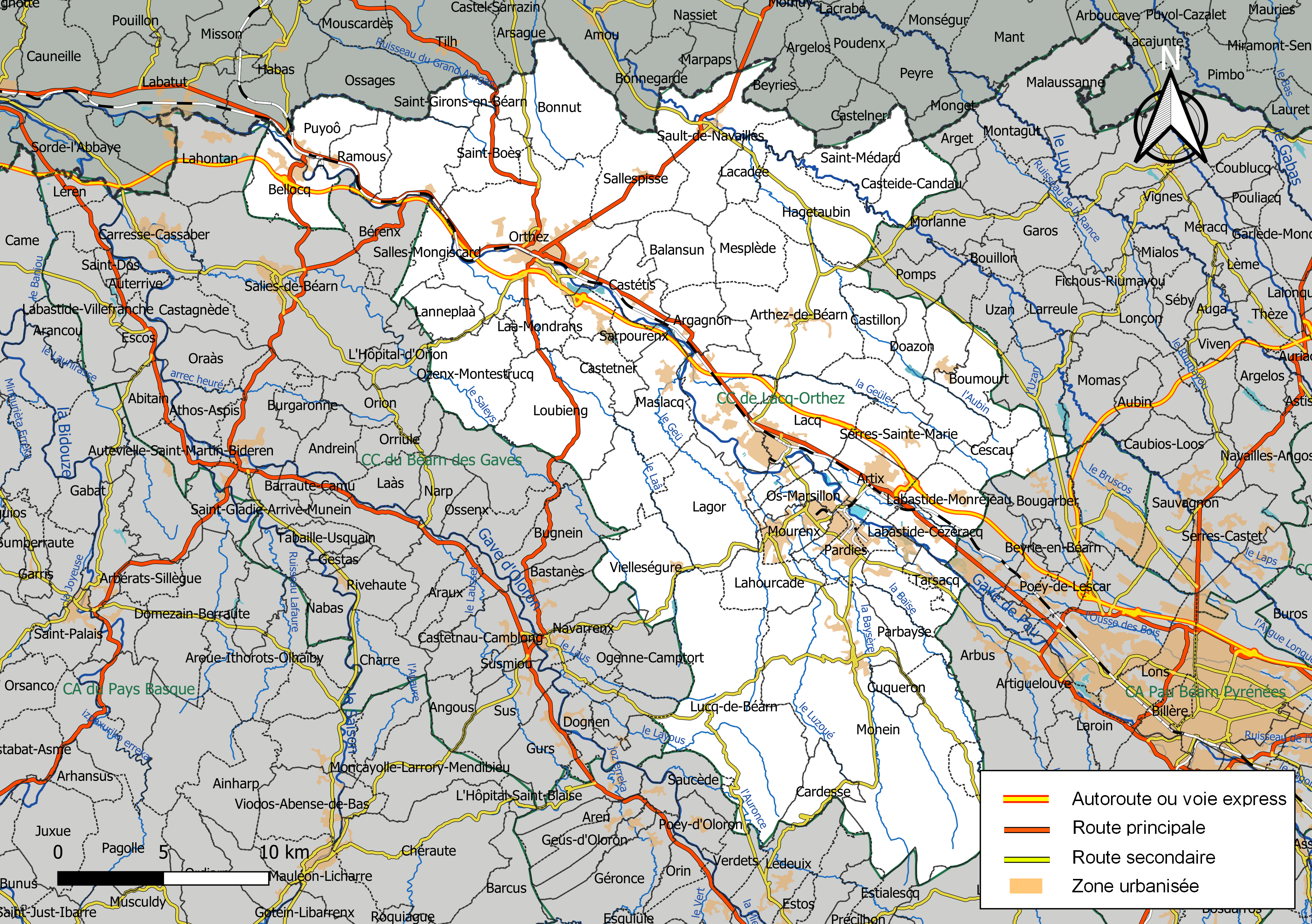 Carte géographique de la Communauté de communes de Lacq-Orthez, département des Pyrénées-Atlantiques, France. Composition au 1er janvier 2019.